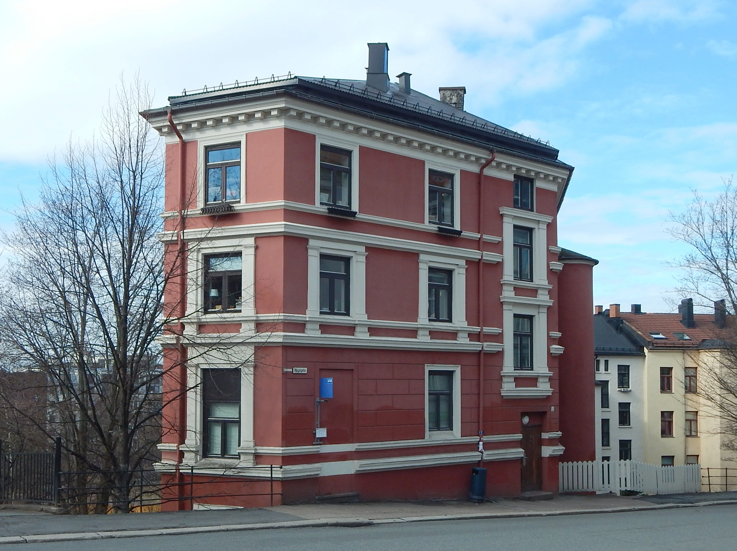 Nannestadgata 2. Arkitekt: Rudolf Haeselich (1896).